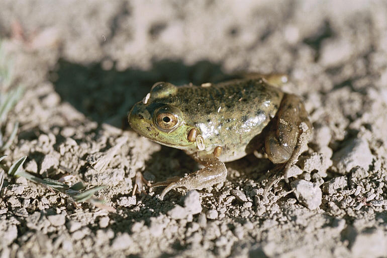 Rana catesbeiana